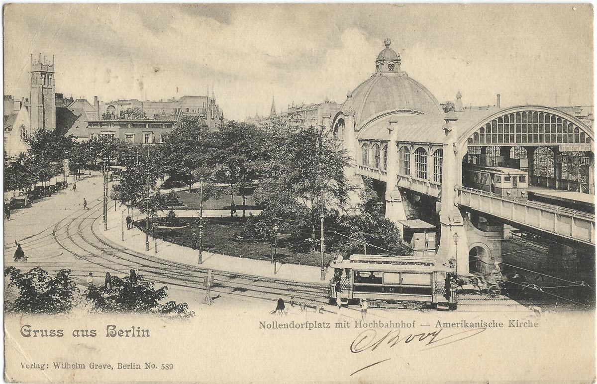 Vue de Berlin au début du XXe siècle (carte postale).